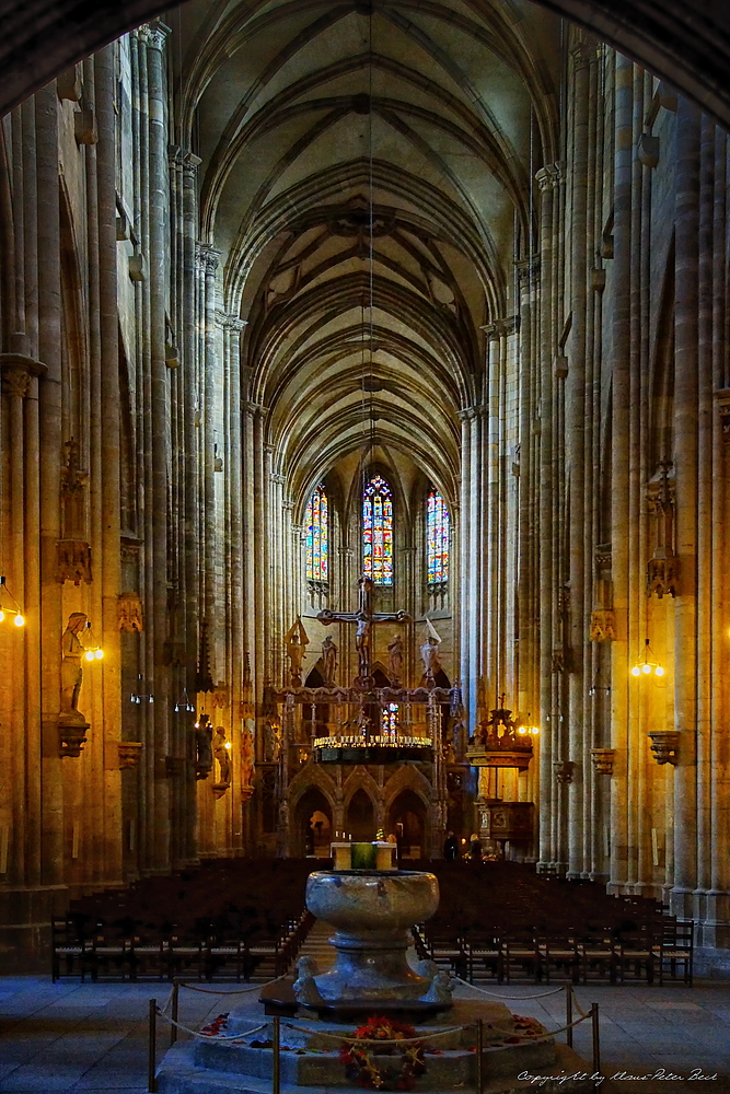 Innenansicht des Halberstädter Domes. Im Vordergrund das Taufbecken